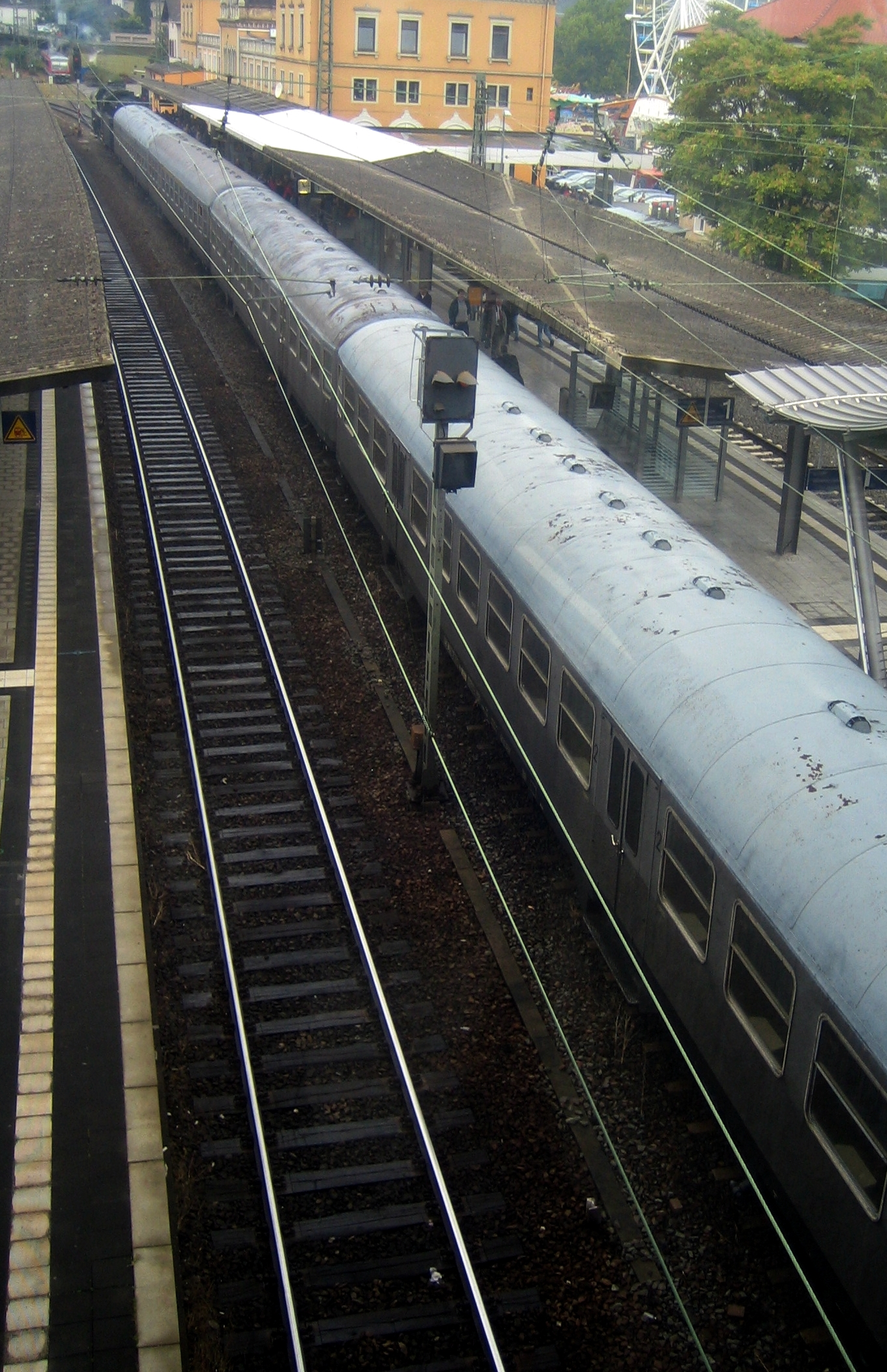 Dampfzug der Maximiliansbahn in Neustadt/Weinstr. Hbf., selbst fotografiert